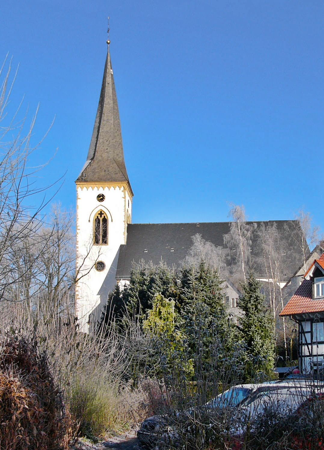 Alexanderkirche in Oerlinghausen, Germany